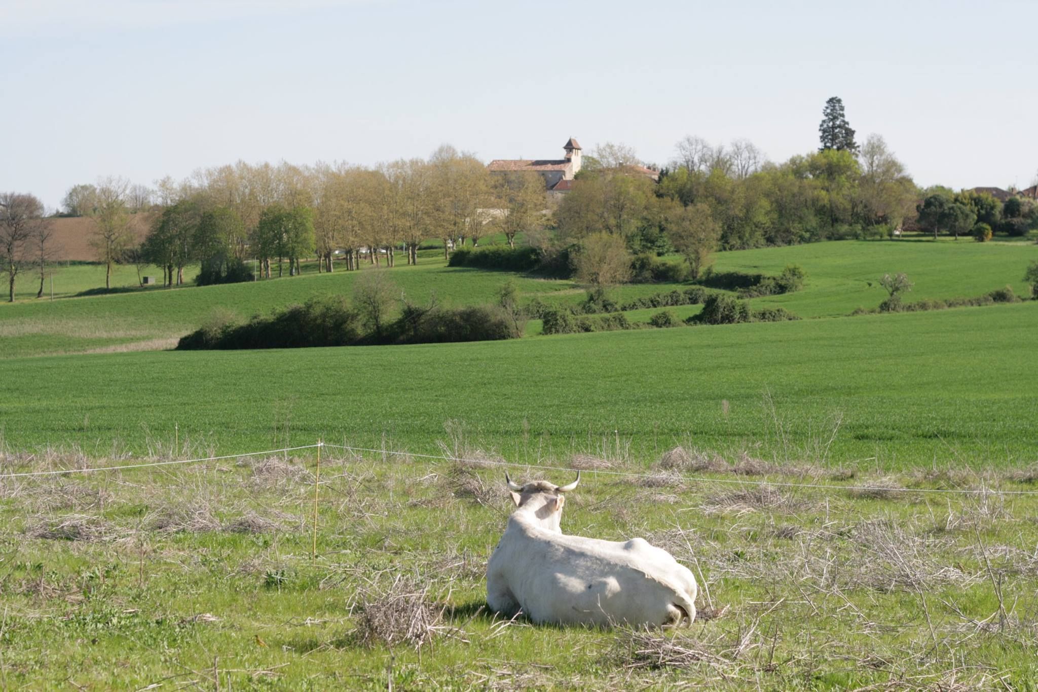 Une vache blanche dans la campagne de Ligardes (Gers, France).